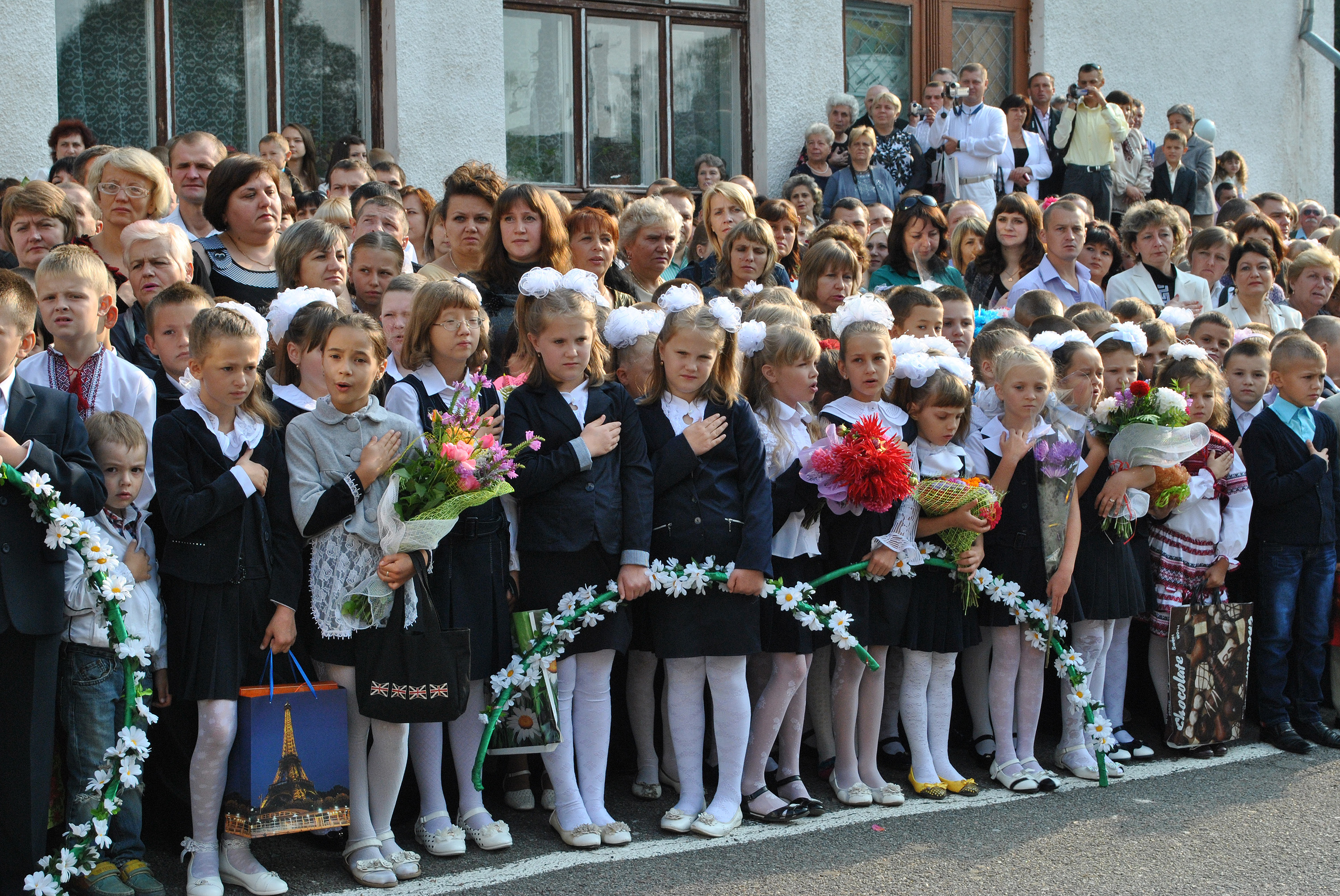 Урочиста лінійка з нагоди початку навчального року в Тернопільському НВК «Загальноосвітня школа І-ІІІ ступенів-економічний ліцей № 9 імені Іванни Блажкевич».